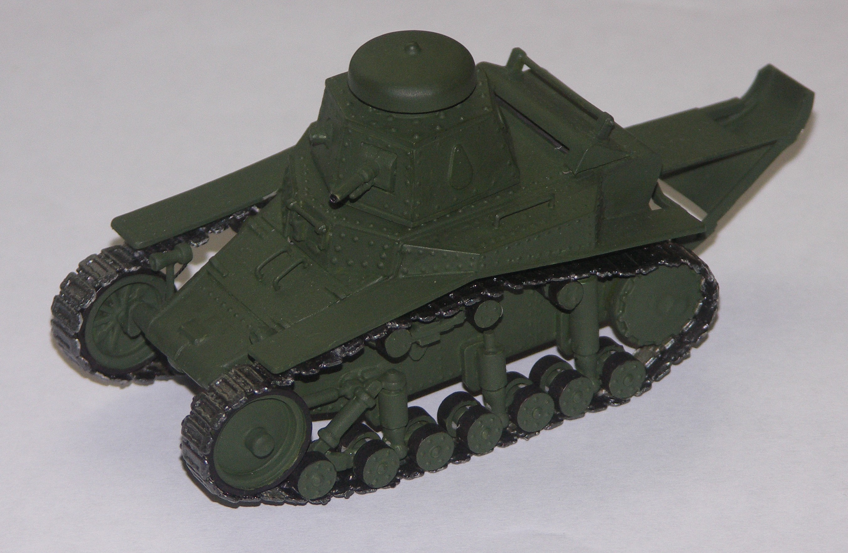 Модель советского лёгкого танка Т-18 (МС-1) в масштабе 1:35 проиводства фирмы AER Moldova